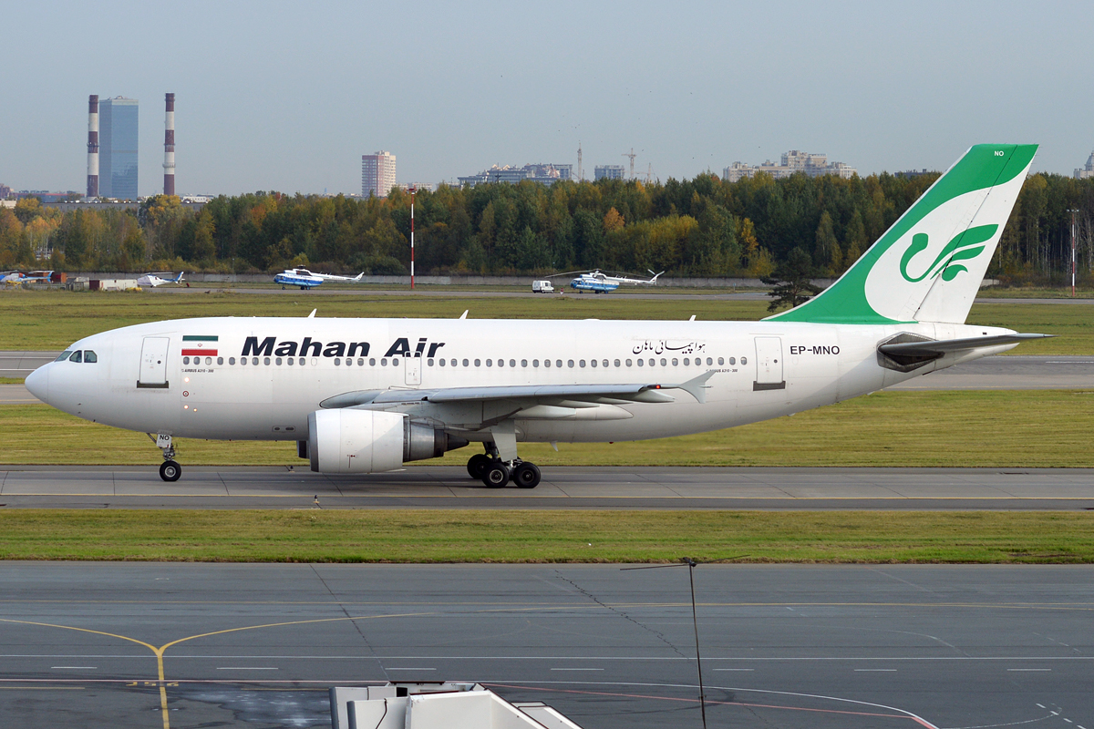 Mahan Air, EP-MNO, Airbus A310-304